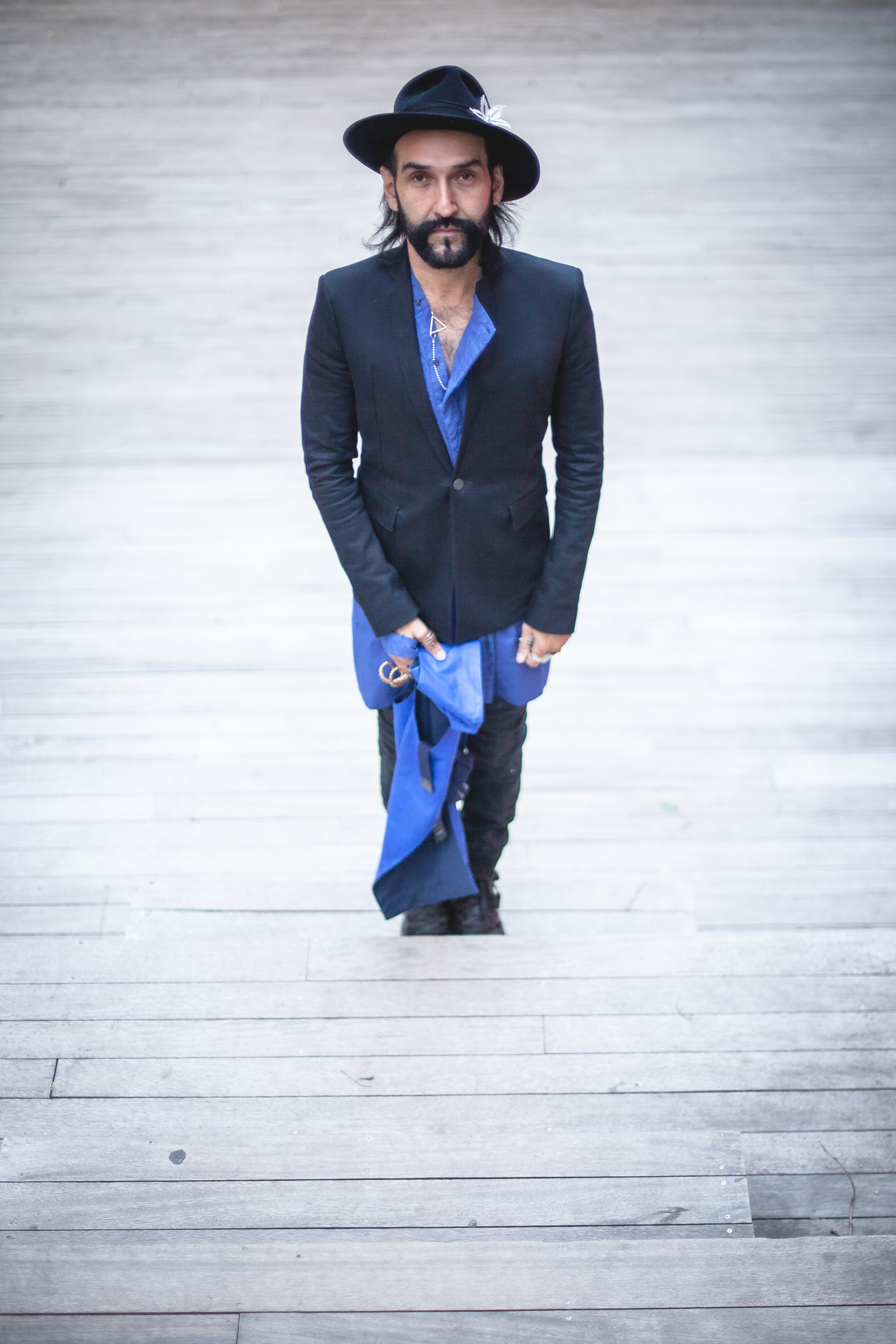 این عکس ها توسط پوریا افخمی در هتل استامبا واقع در شهر تفلیس کشور گرجستان ثبت شده است